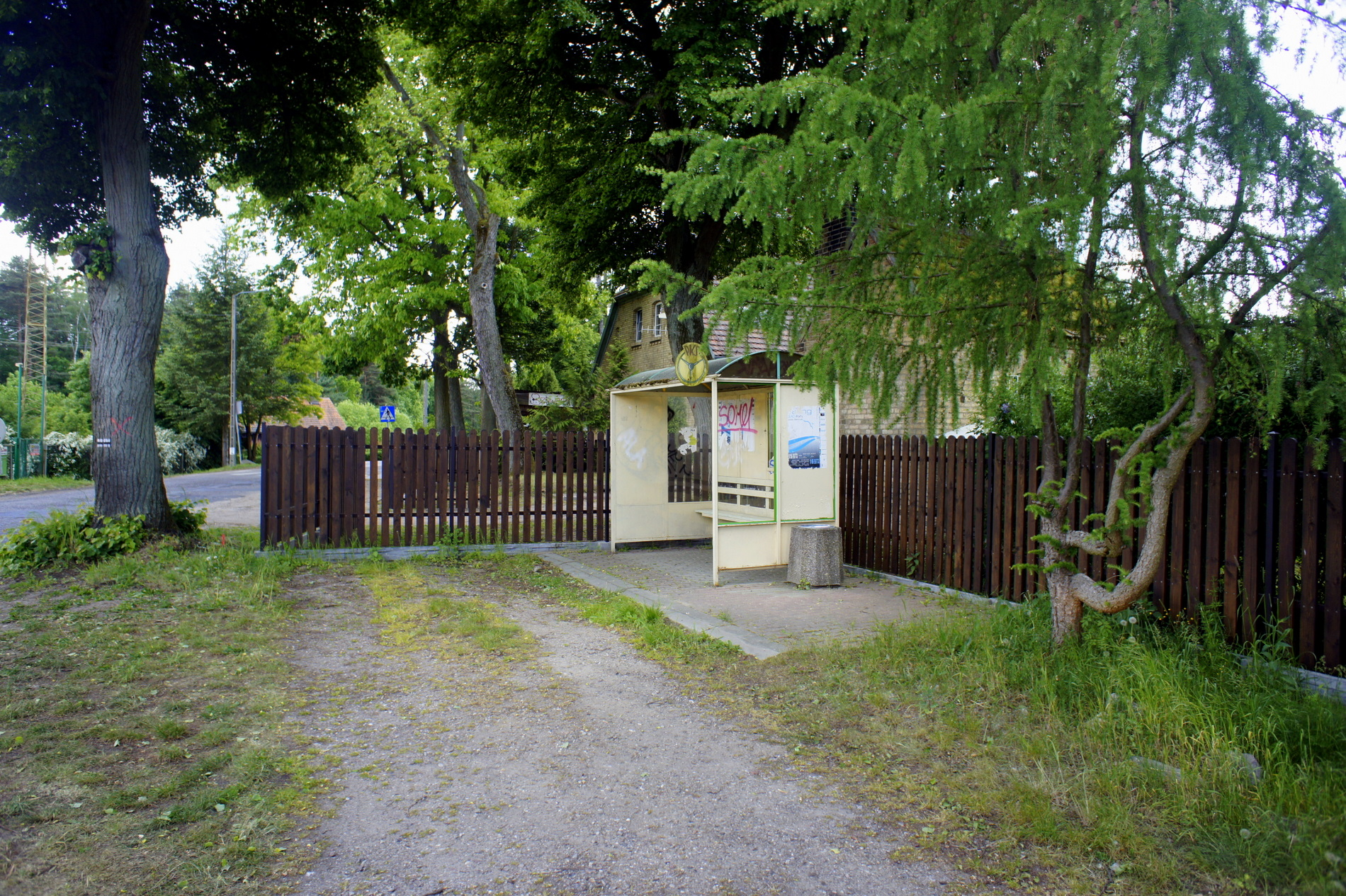 Przystanek PKS w osadzie Lubociesz ( Lipy, woj. lubuskie )